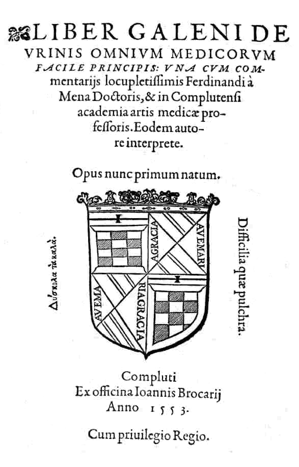 Portada del libro Liber Galeni de vrinis omnium medicorum facile principis. Publicado por Fernando de Mena en Alcalá de Henares, en 1553.